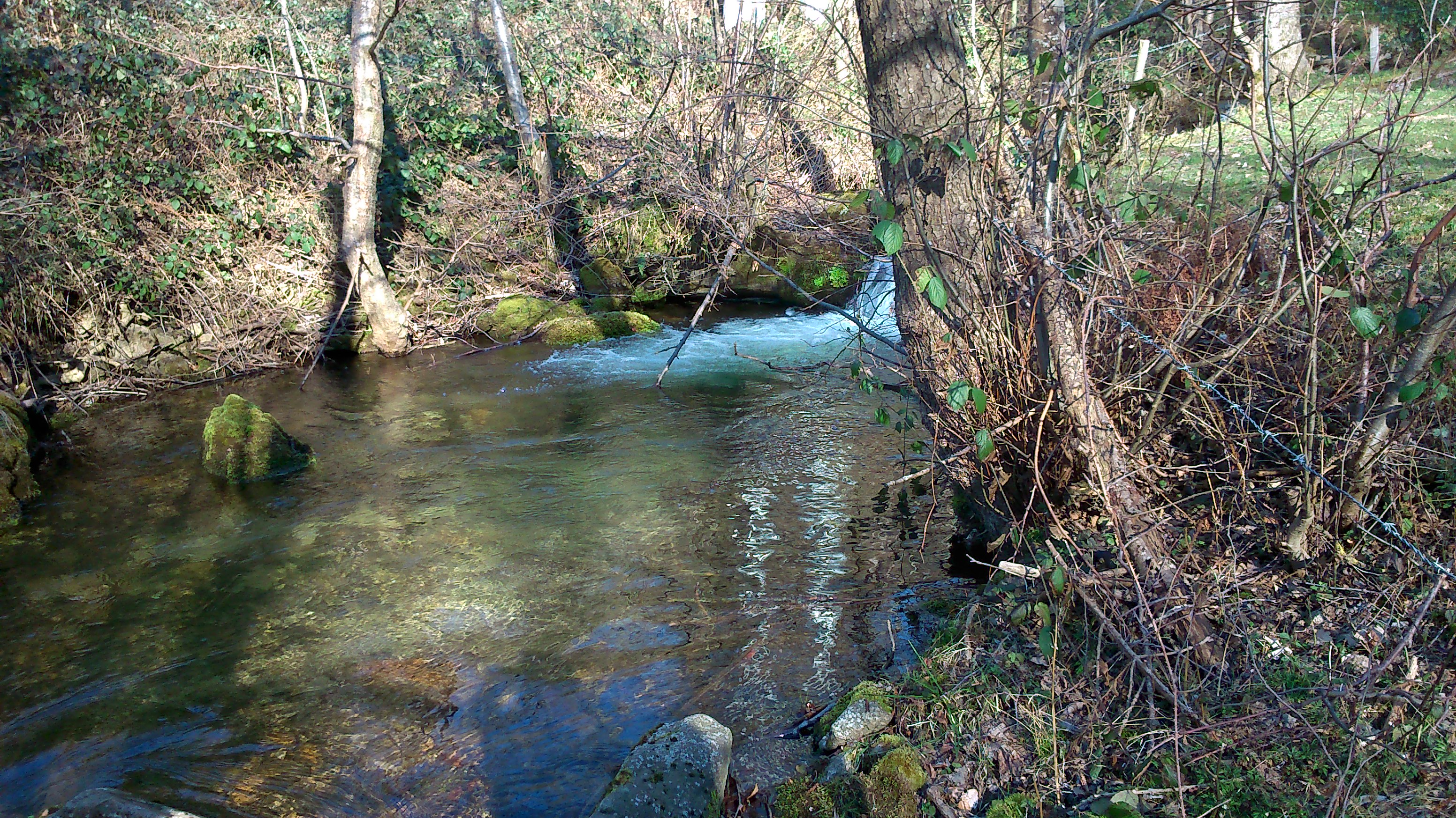 Le Haut-Gier sur la commune de La-Valla-En-Gier